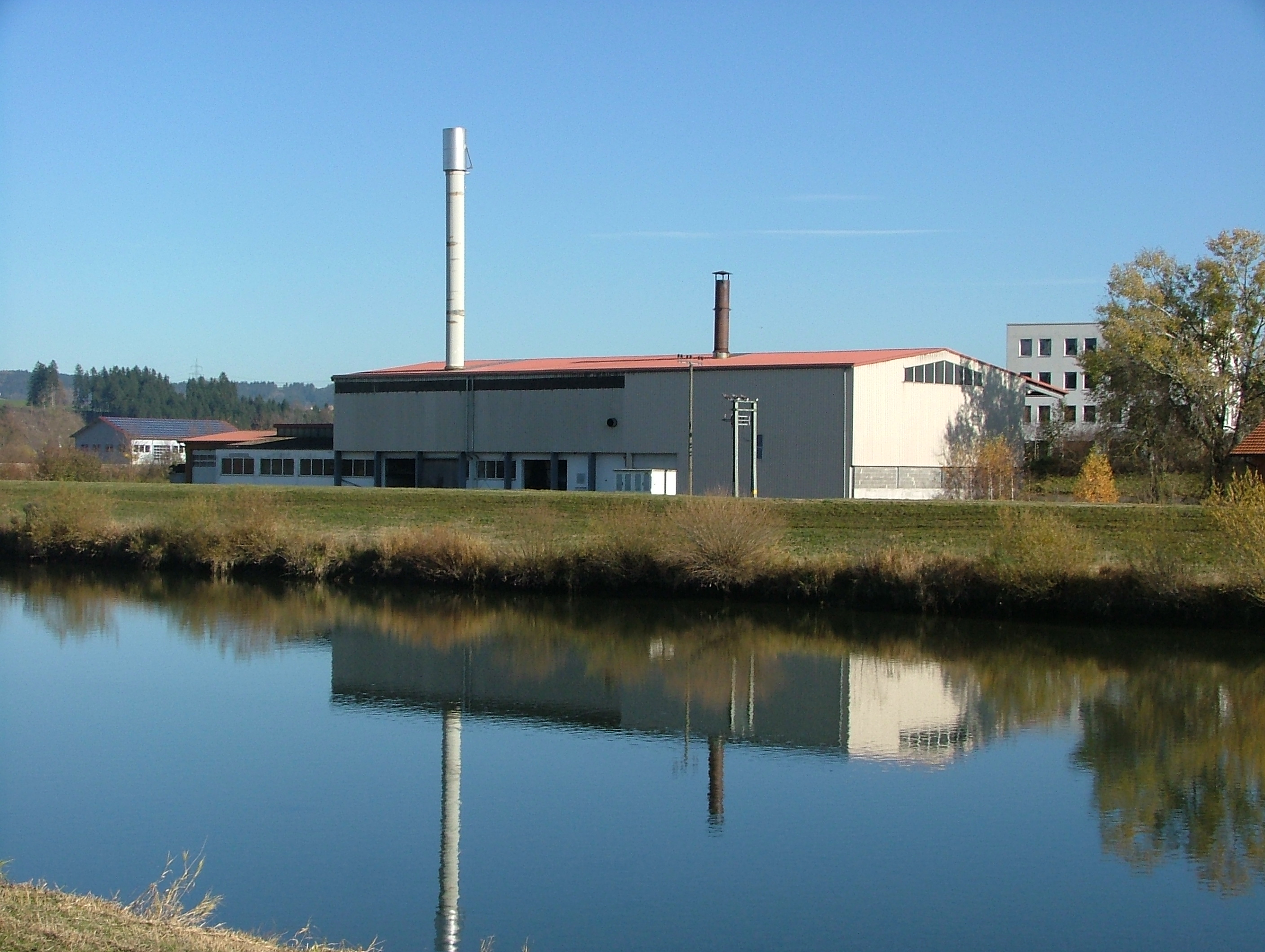 Grastrocknungsanlage